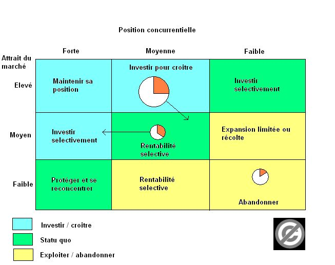 schema de la matrice de McKinsey. je suis l'auteur de ce schema, les droits sont donc dans le domaine public.